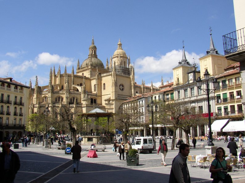 Segovia. (Castilla-León. España) Plaza Mayor. Fotografía realizada el 21 abril de 2003 por el autor:User:Pelayo2